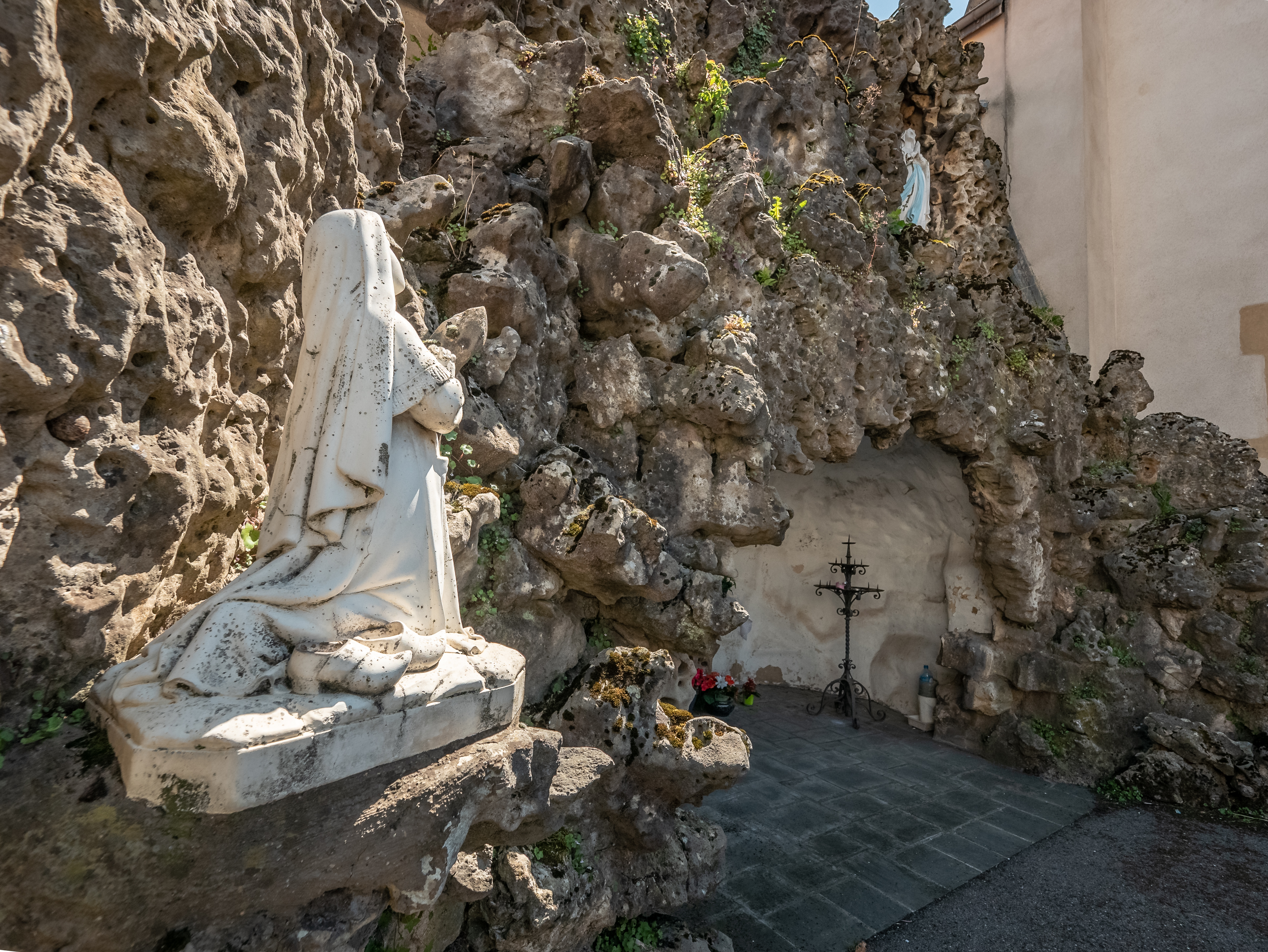 Grotte située à l'extérieur de l'Eglise de Longeville-lès-Metz